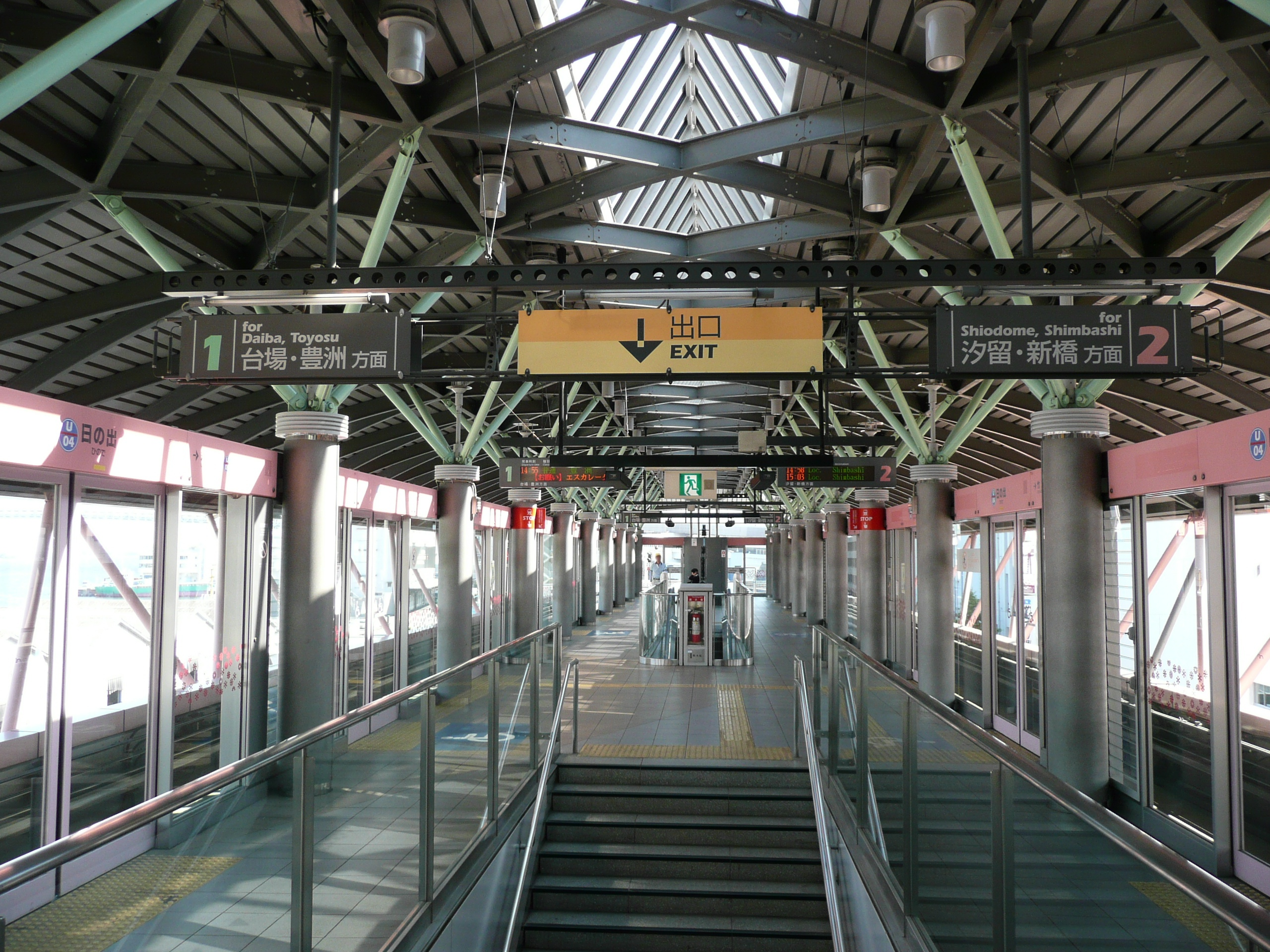 日の出駅ホーム